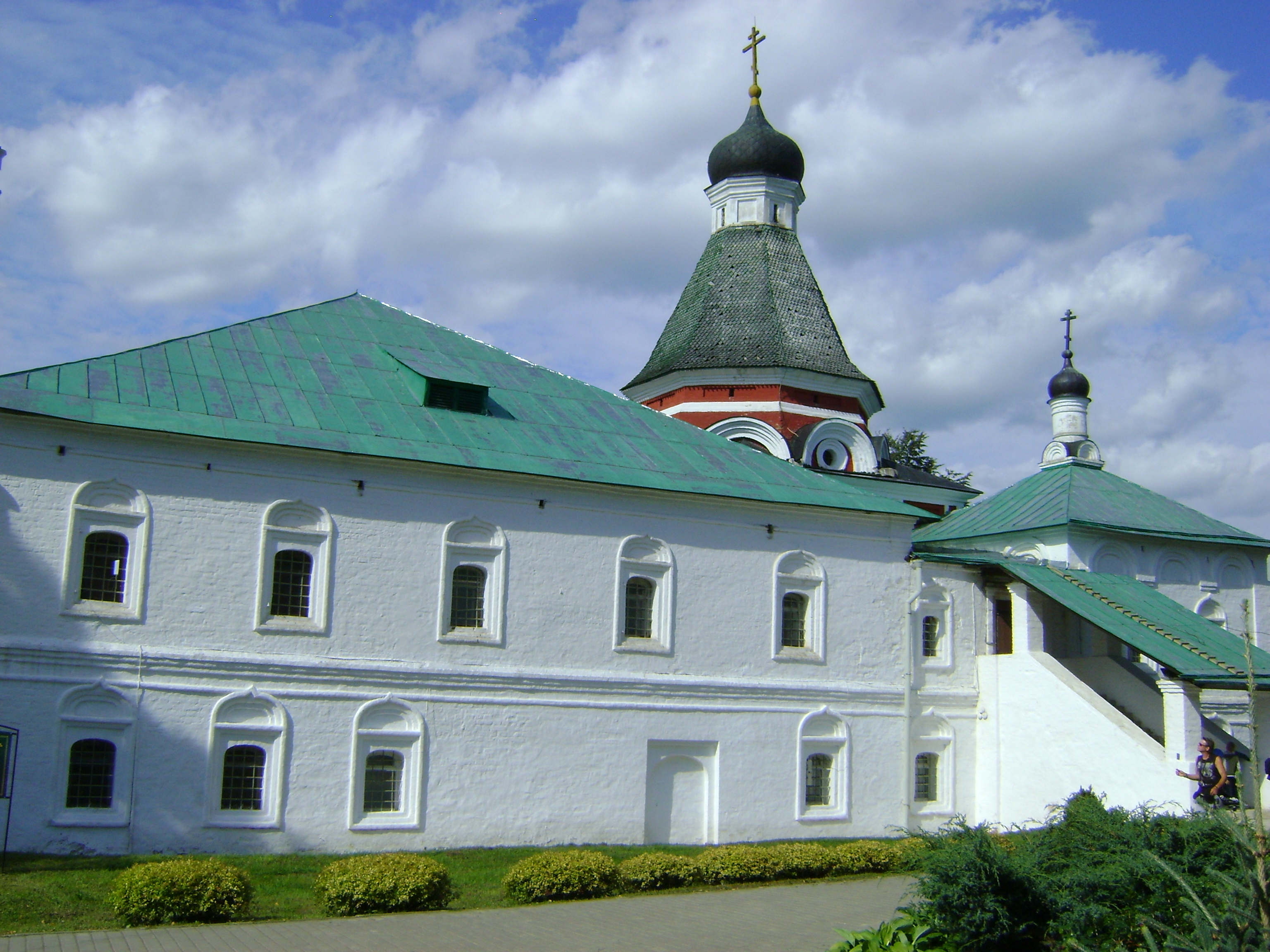 Колишній палац Івана Грозного в Александрівській слободі. Місто Александров, Владимирська область, Росія.